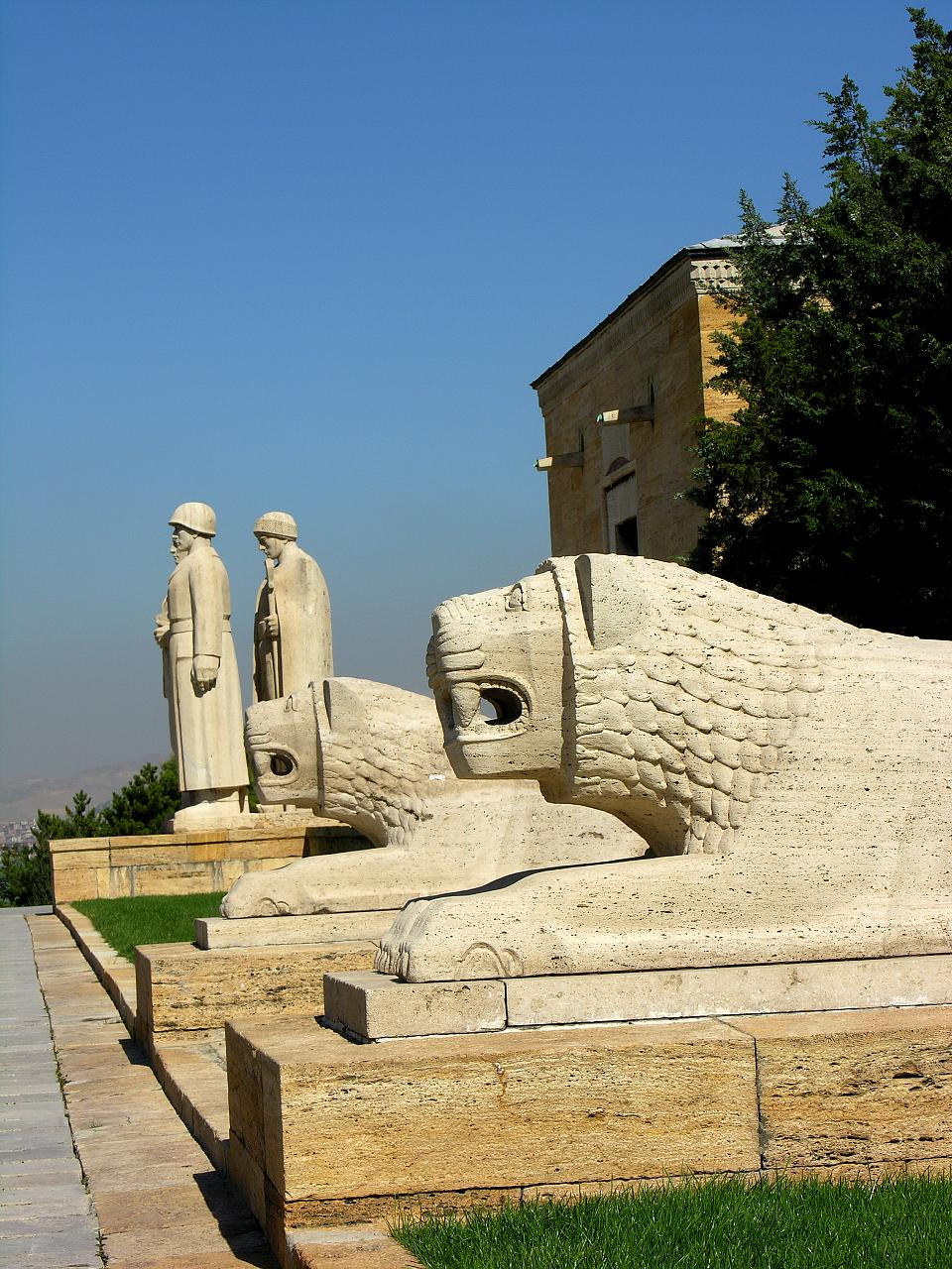 Turkey-1644